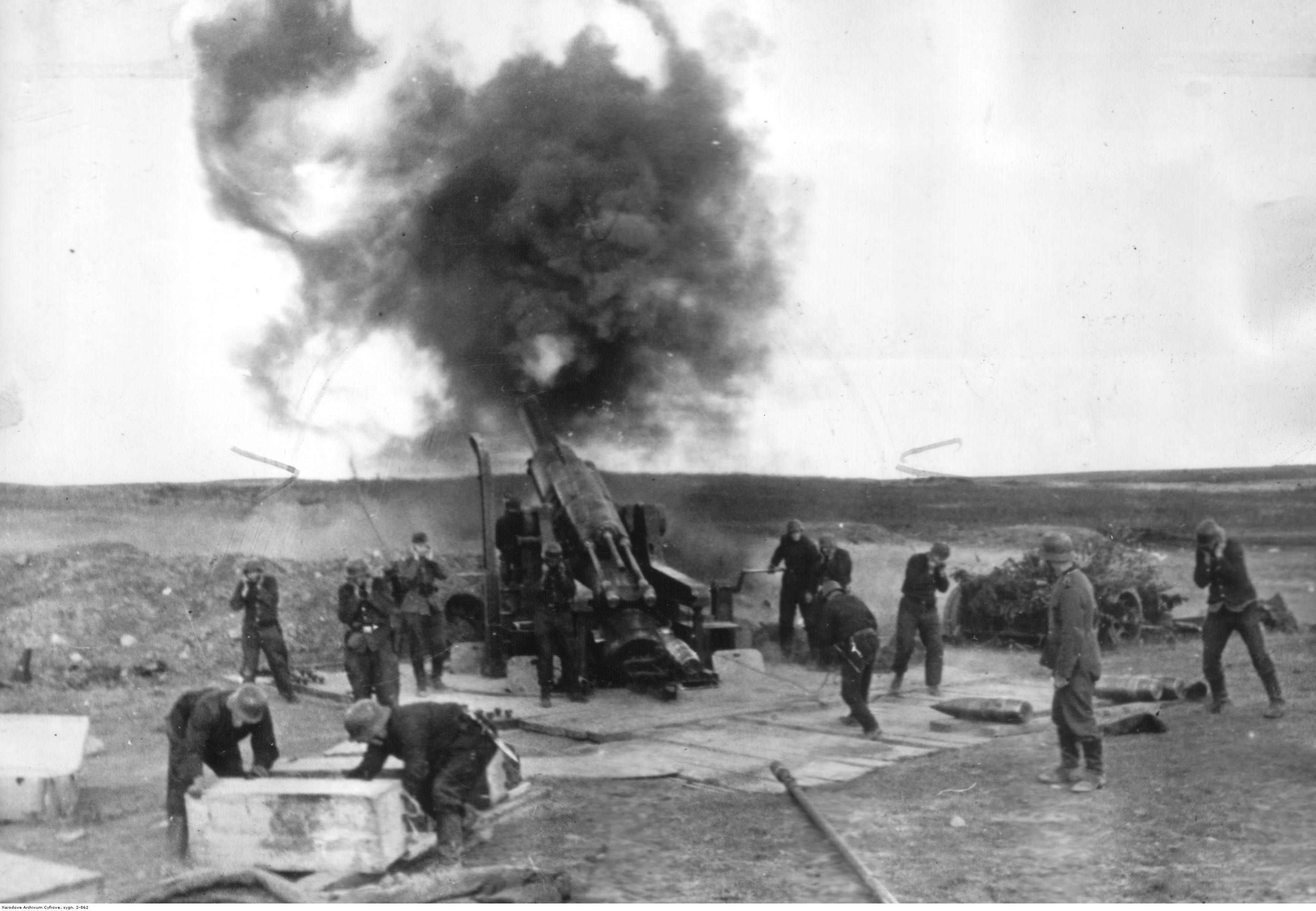 Czeska haubica kal. 240 mm prowadzi ostrzał Leningradu.